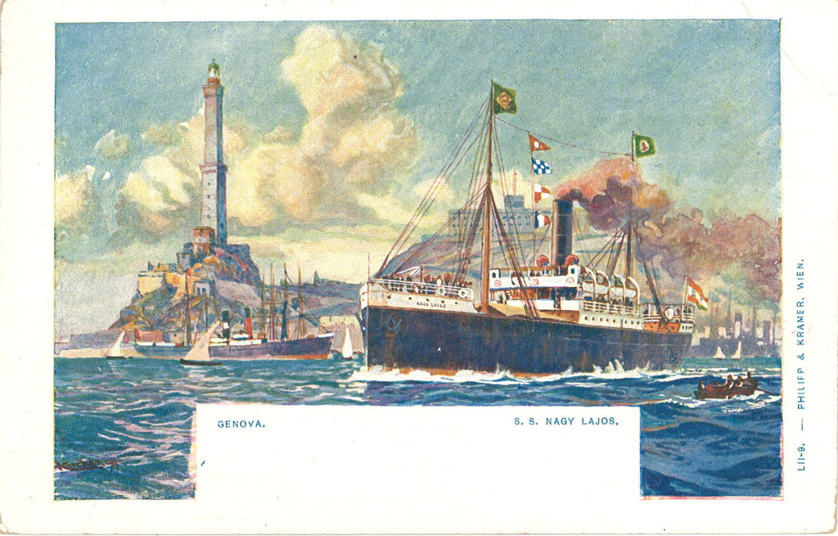 Postkarte mit SS "Nagy Lajos" der Adria AG Fiume (ca. 1900) Bild: A. Kircher (1867-1939)